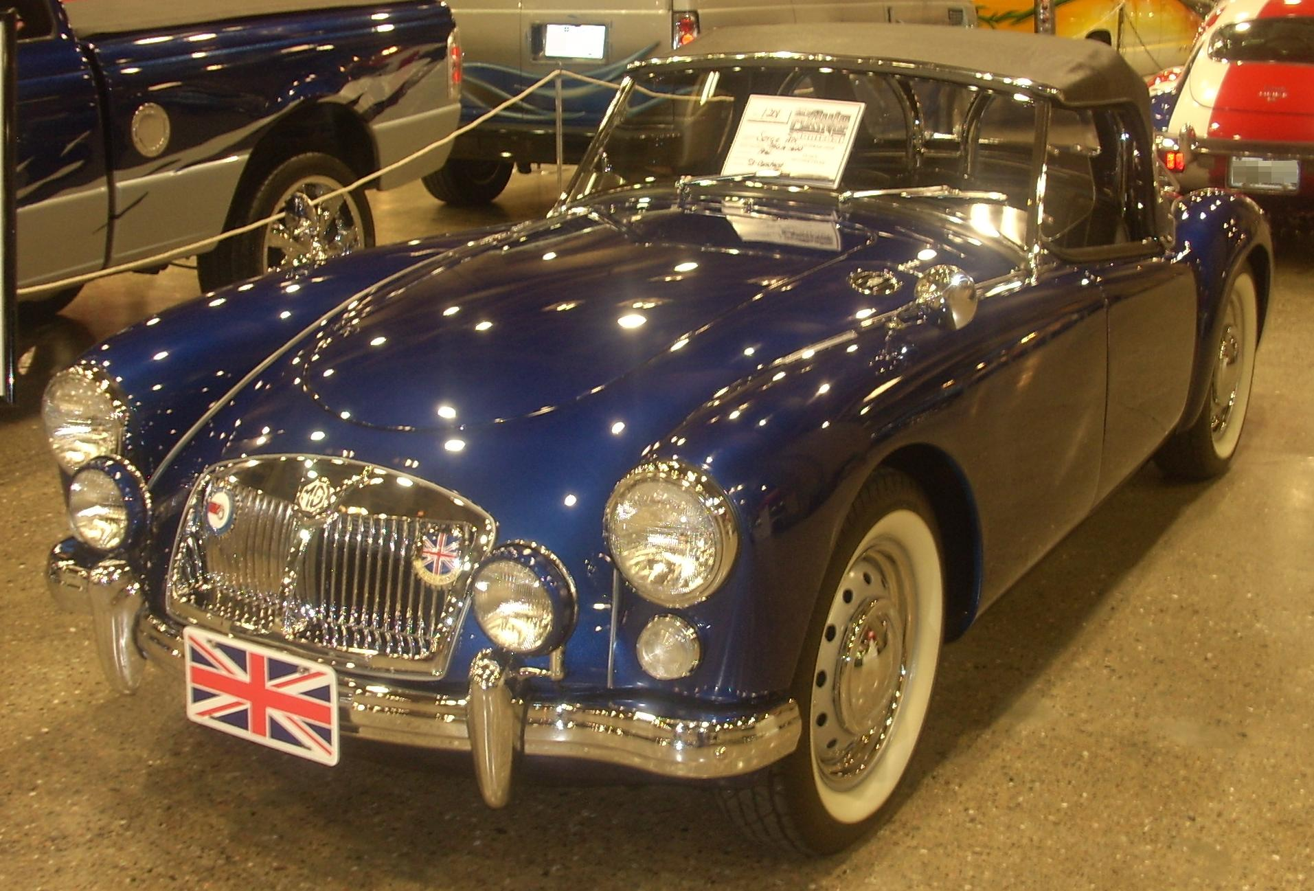 1961 MG MGA photographed at Auto classique Montréal 2008.